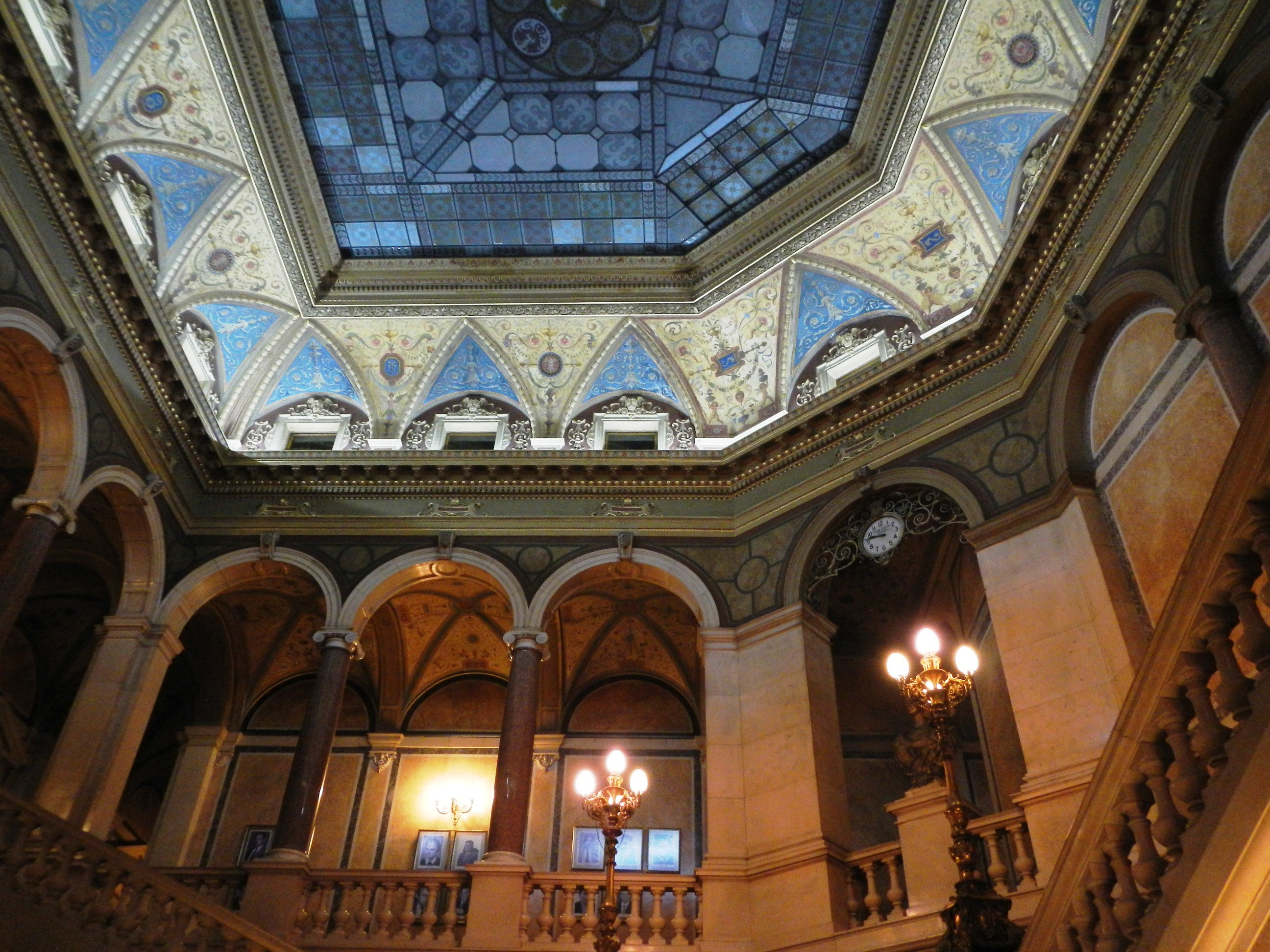 Ентеријер зграде Народне банке.